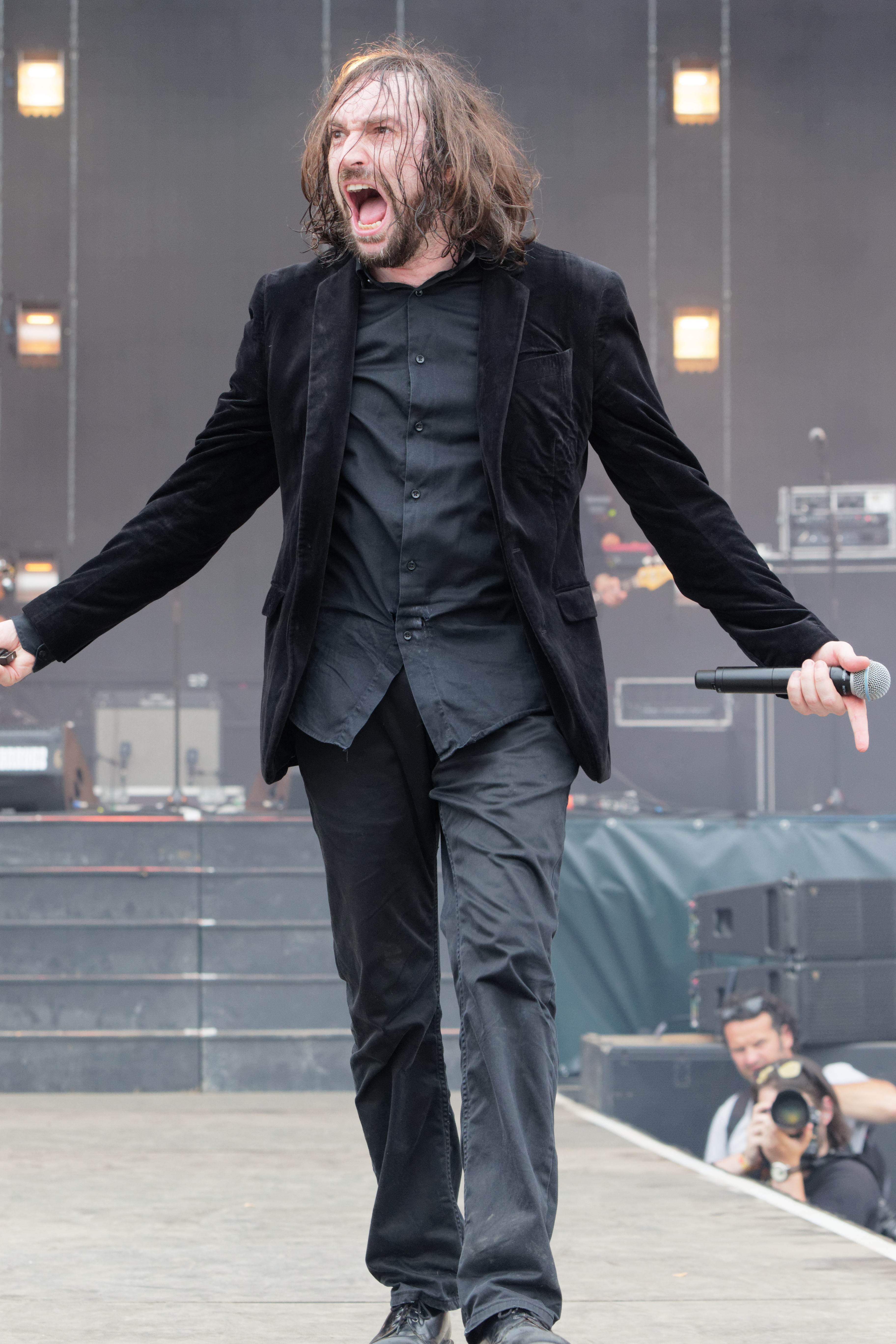 Matmatah en concert lors du festival des vieilles charrues 2017.